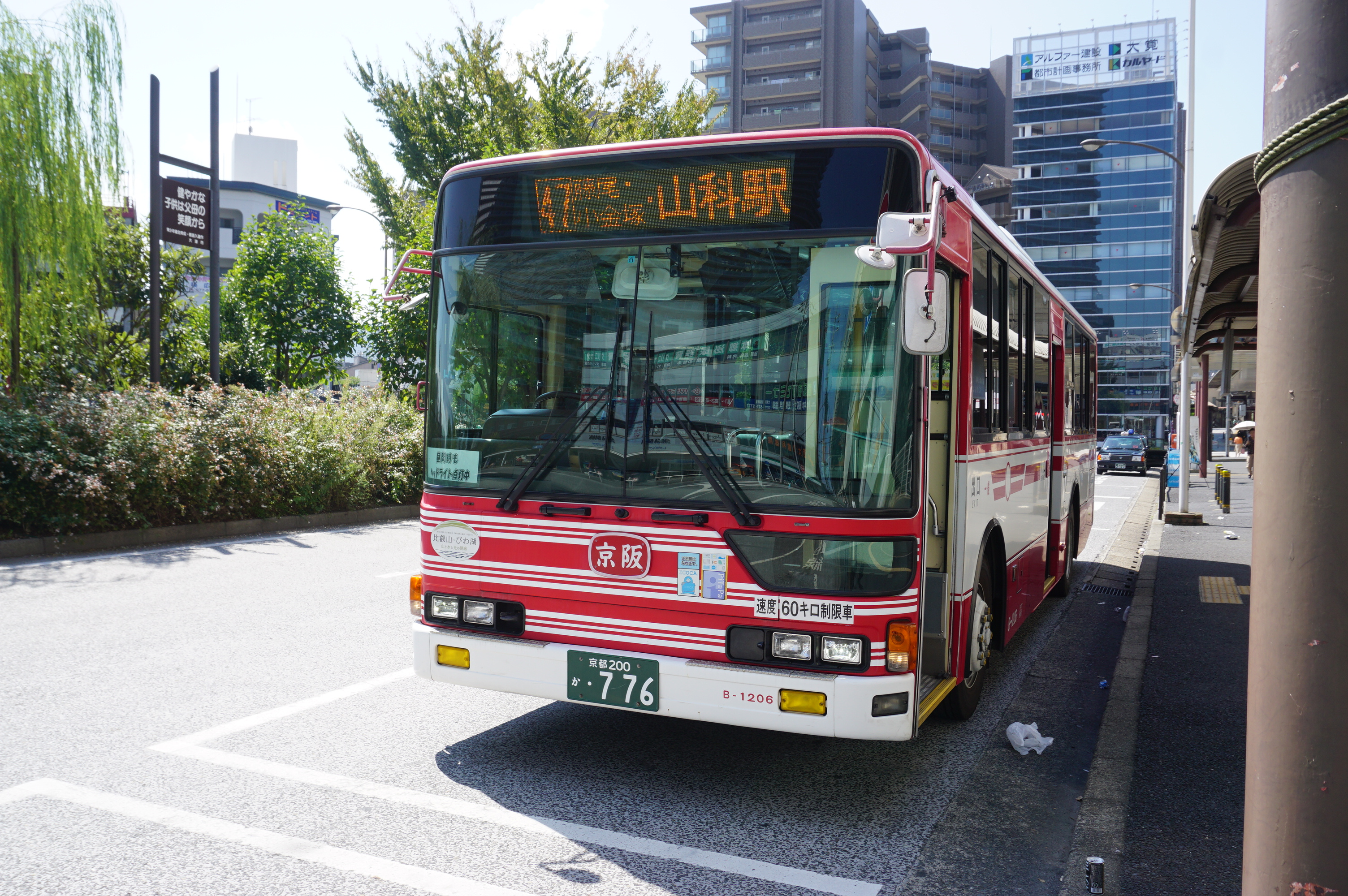 47系統（大津京駅前にて）